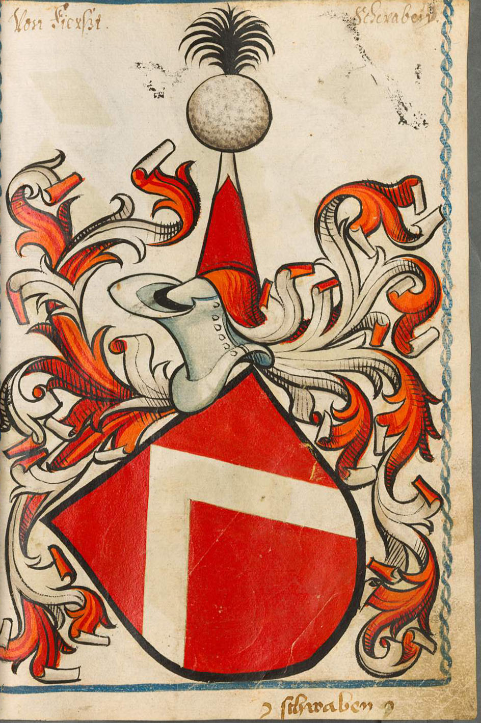 Scheibler'sches Wappenbuch, älterer Teil; Seite 193 Von Fierßt Schwaben